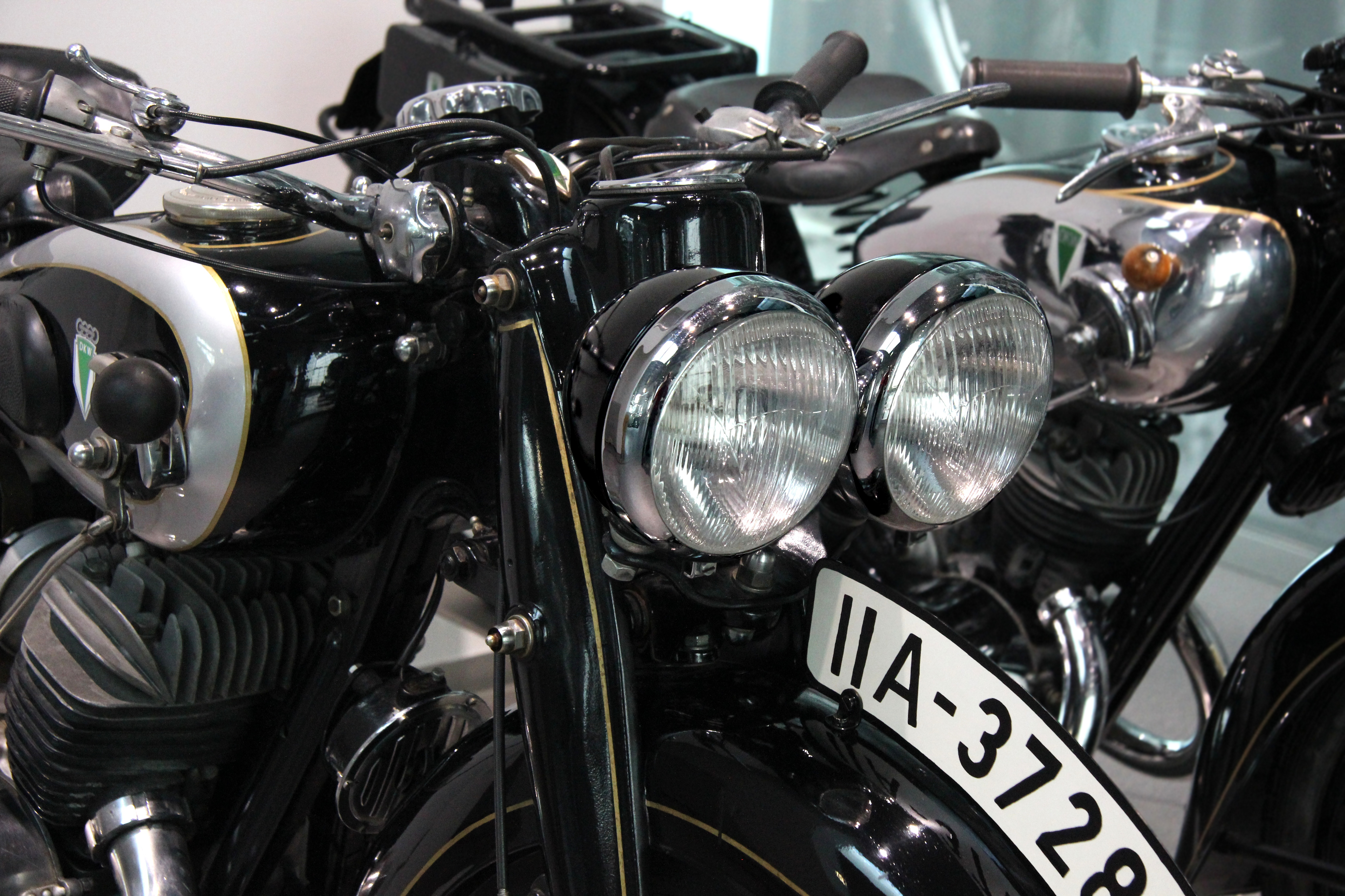 Doppelscheinwerfer einer DKW SB 500 A, 2. Serie, Baujahr 1936, im museum mobile in Ingolstadt. Zweizylinder-Zweitaktmotor, 494 cm³, 15 PS bei 4000/min, Höchstgeschwindigkeit 115 km/h; Preis 995,00 RM, 13.300 Stück von 1936 bis 1939 gebaut.